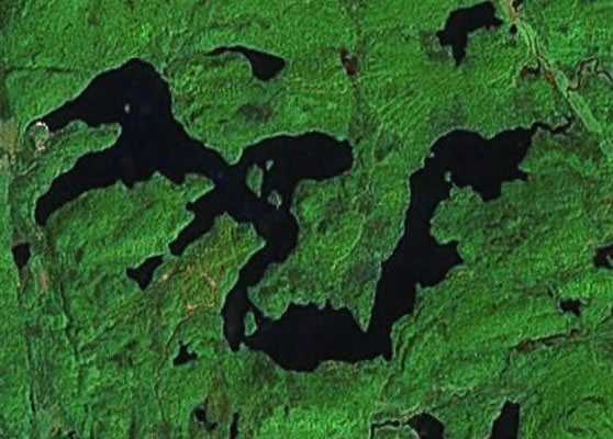 Ville de Barkmere